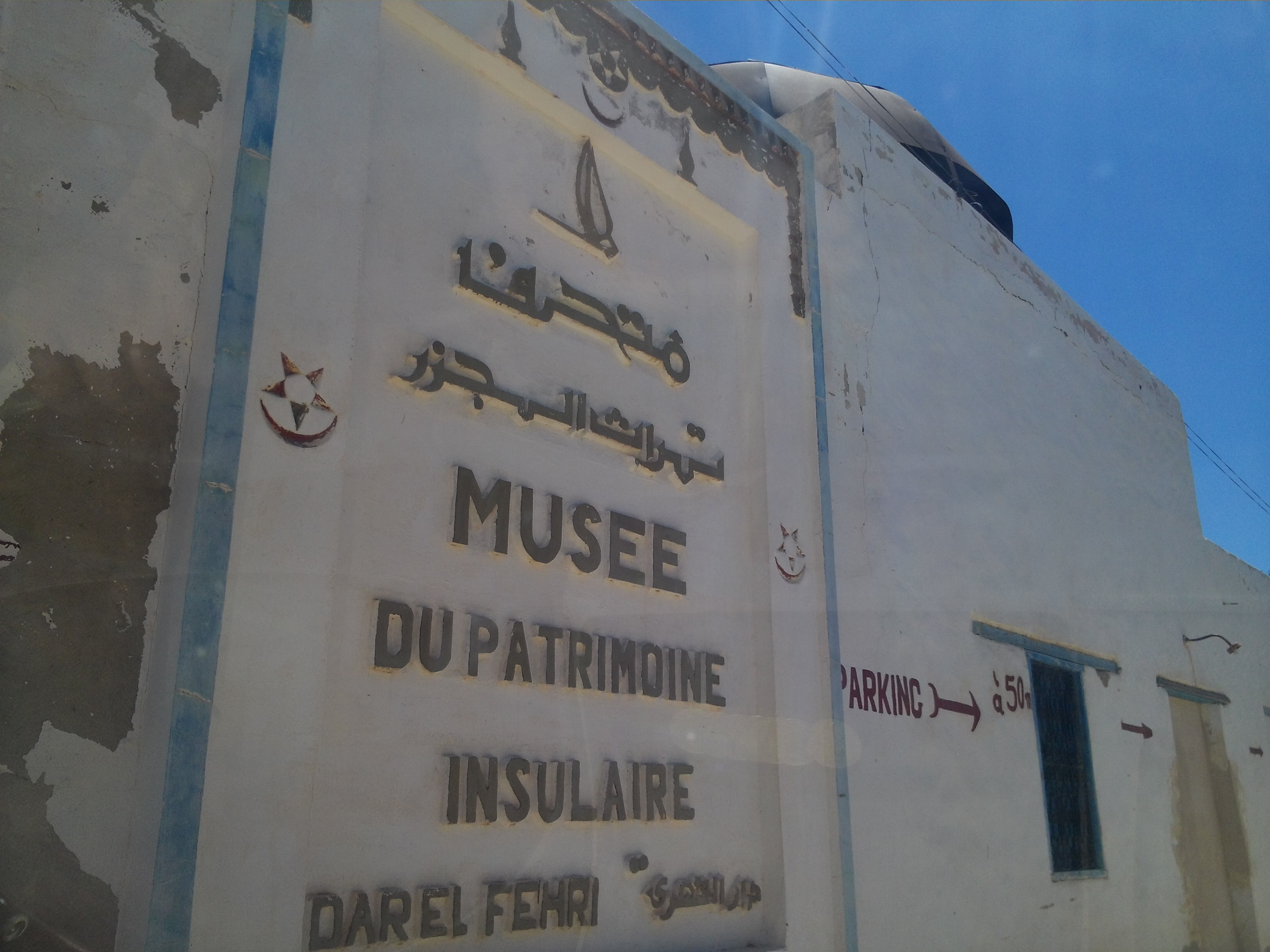 Музей на Керкенських островах